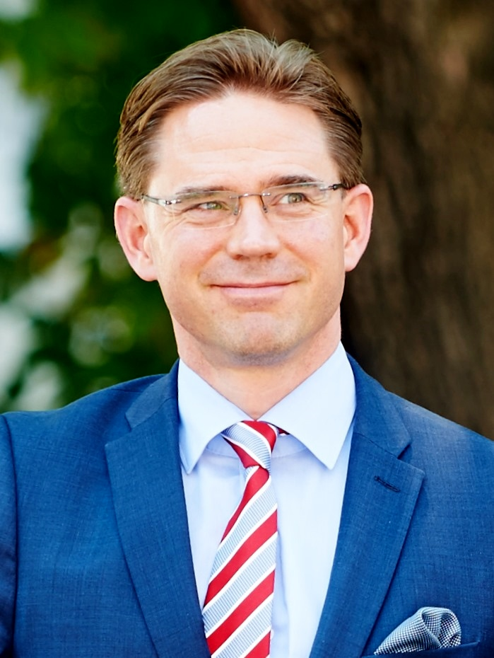 Jyrki Katainen